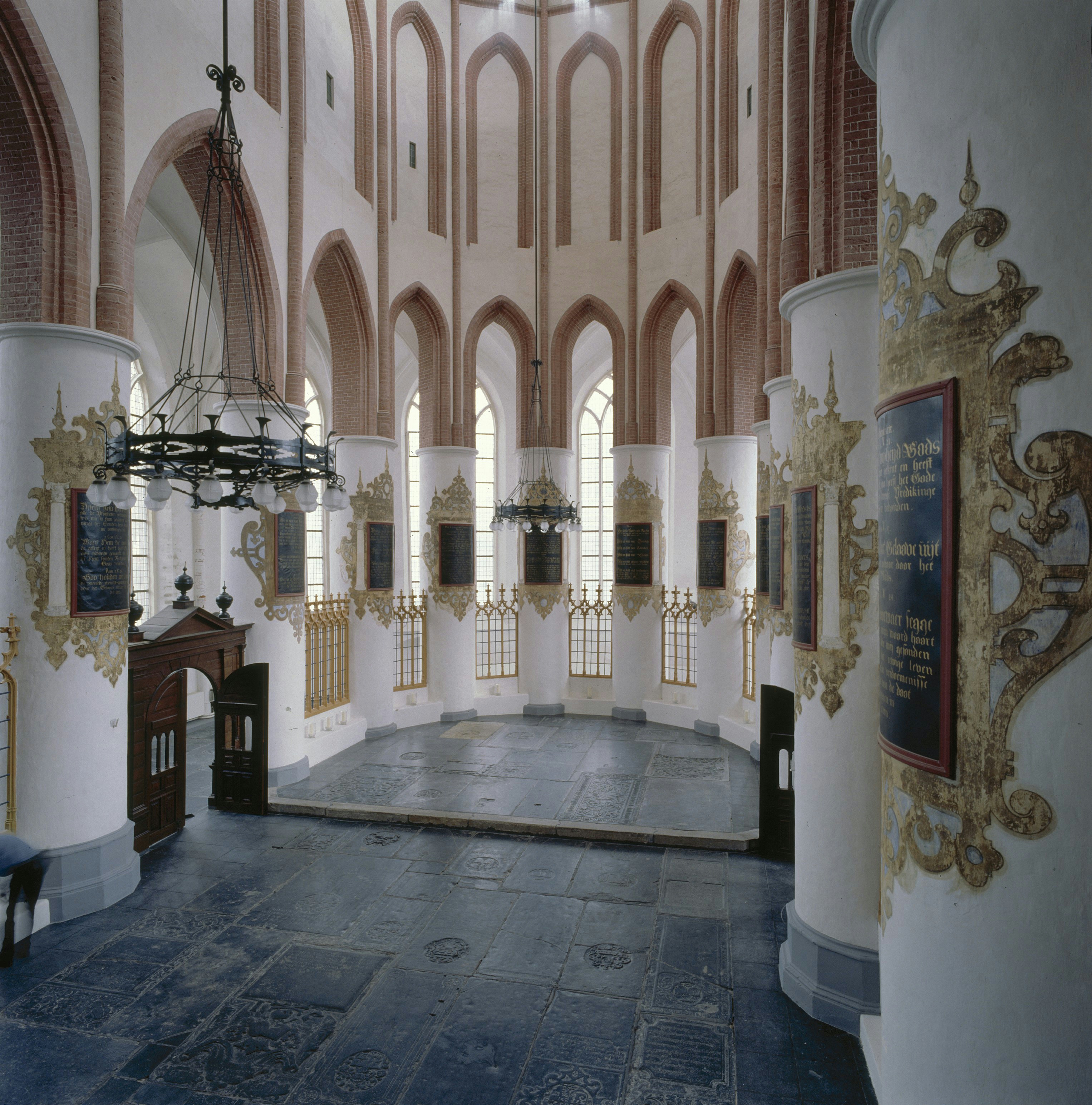 Der AA-kerk: Interieur, overzicht koor